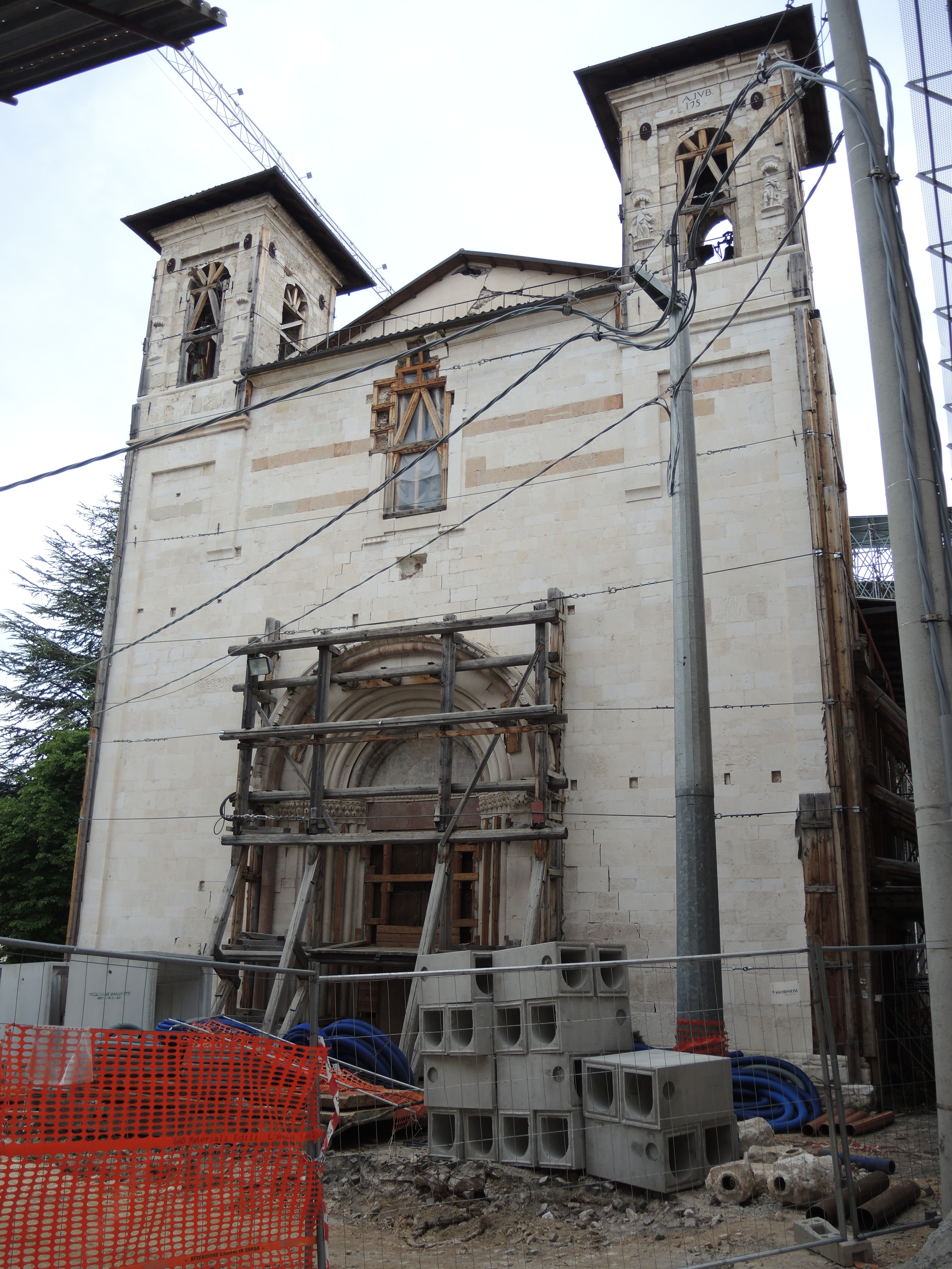 L'Aquila - Chiesa di San Marco